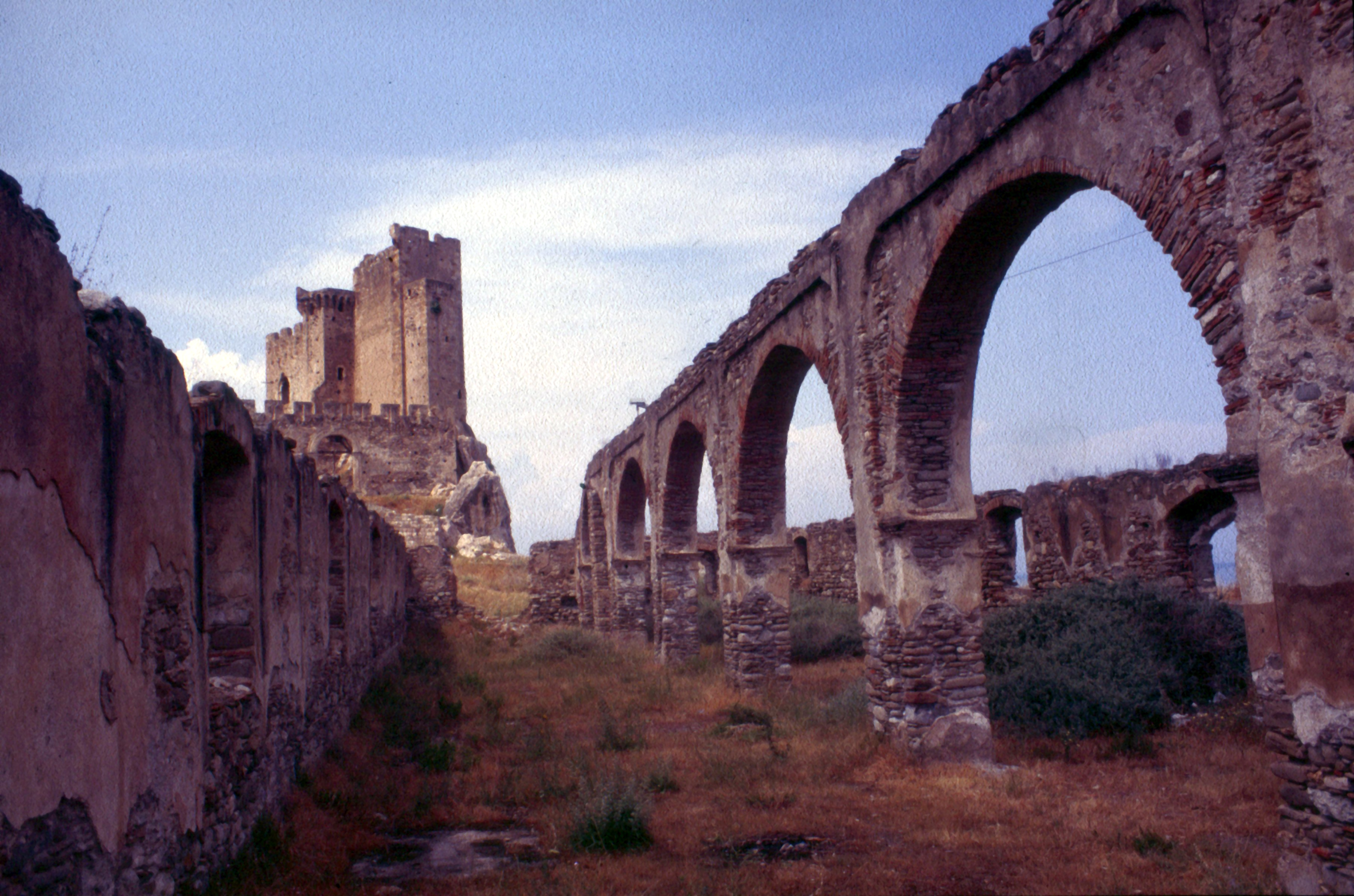 Roseto Capo Spulico, Castello della Pietra